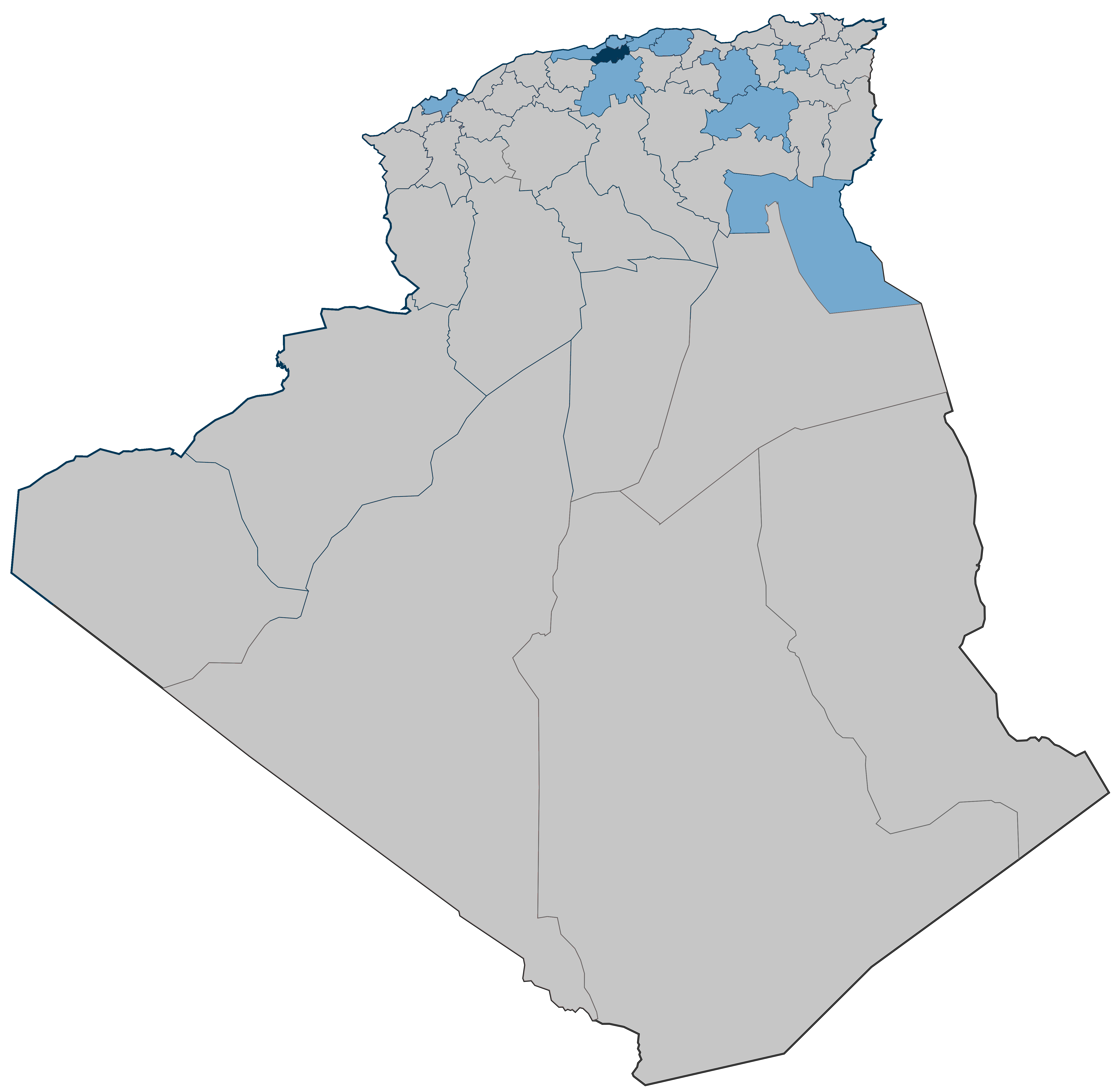 Wilayas sous confinement en Algérie au 27.03